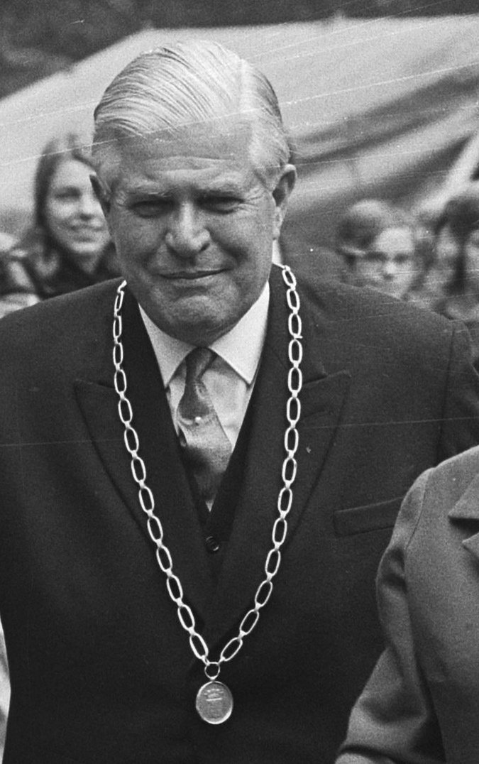 Prinses Margriet begroet in gezelschap van de burgemeester van Oegstgeest T. van Eysinga enkele bezoekers